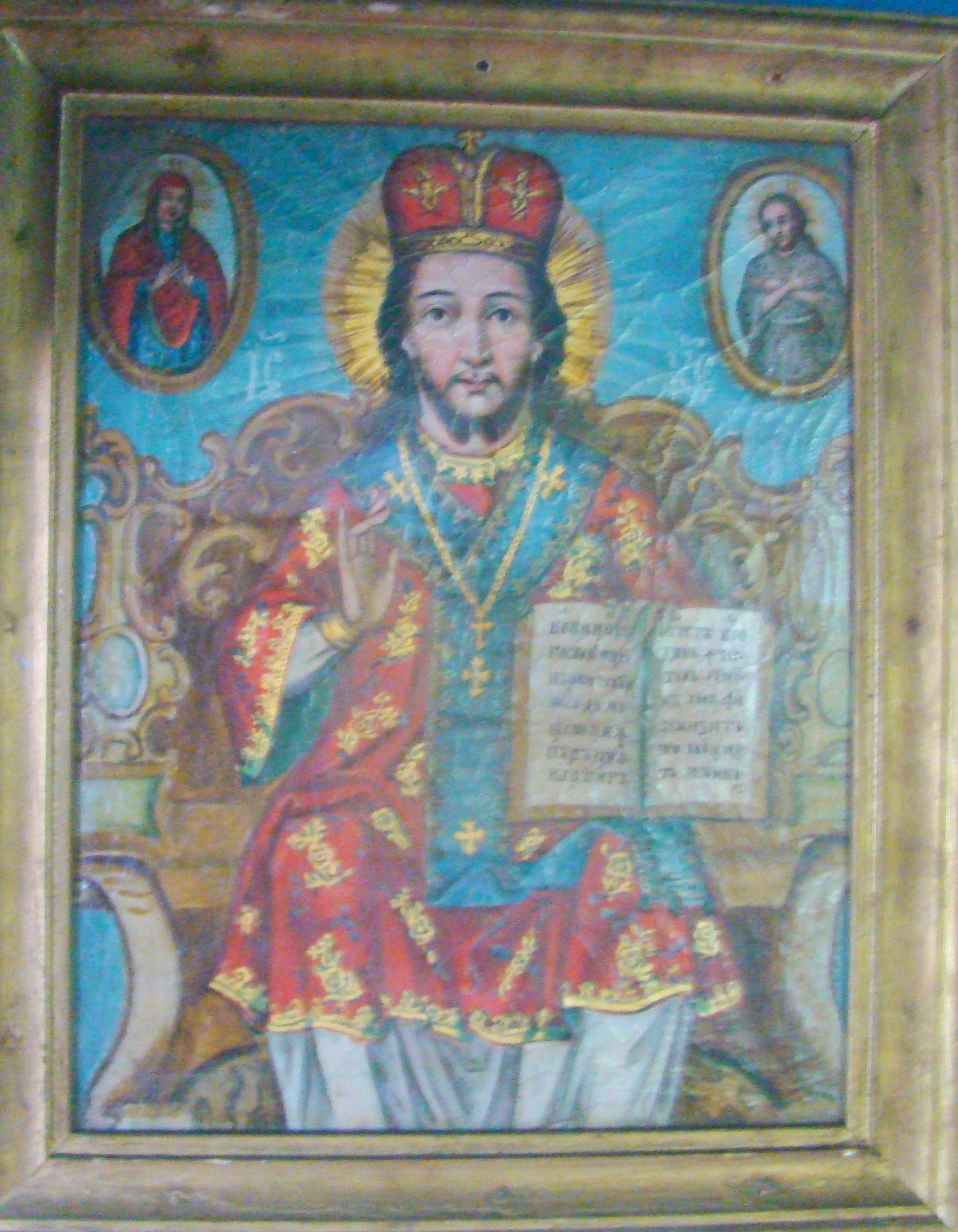 Biserica de lemn "Sf. Ioan Evanghelistul" , sat IZVOARELE; comuna CERNEŞTI